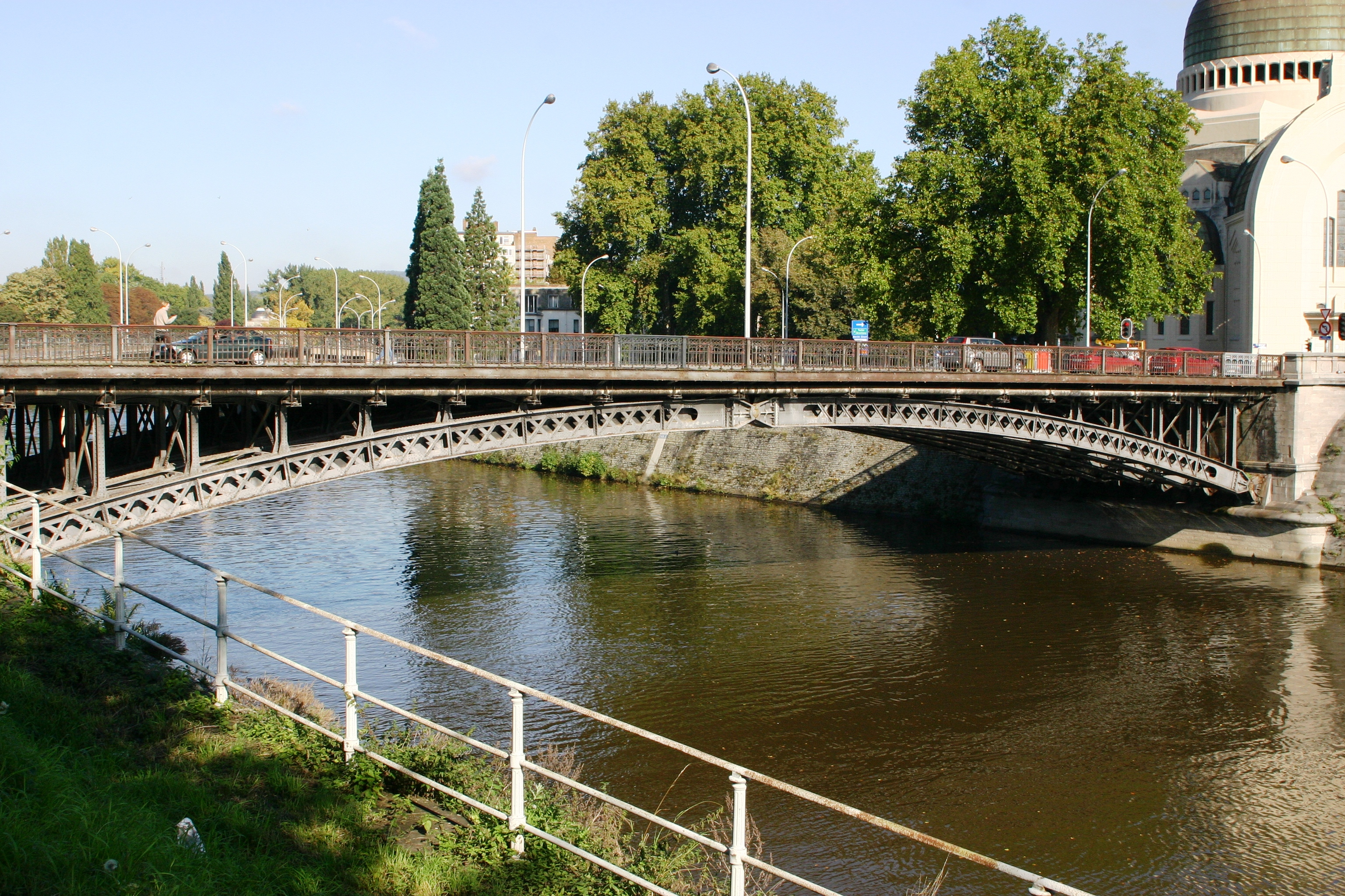 Pont de Fetinne vum lénksen Uwänner.